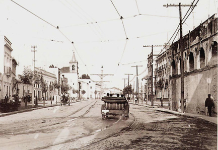 Fotografia de la entrada de la calle Oriente (hoy Luis Montoto) en 1927. Note the tramtracks.